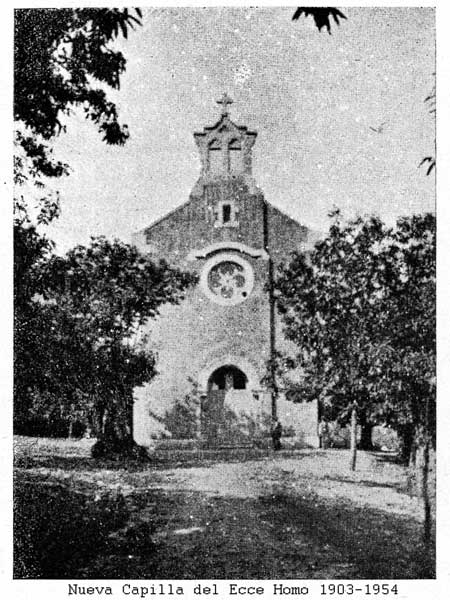 Fotografía de la Capilla del Ecce Homo.